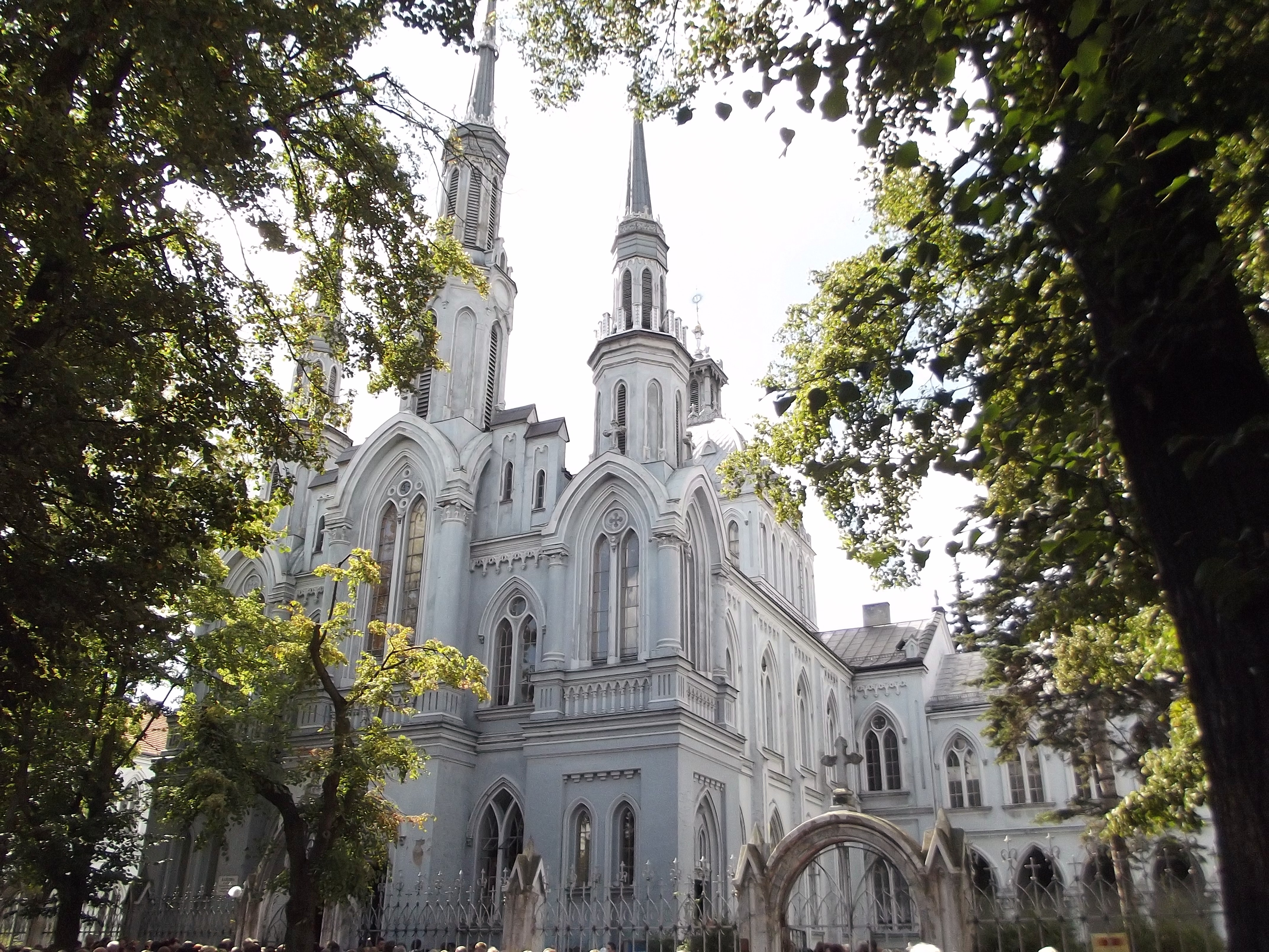 Płock, zespół klasztorny mariawitów, pocz. XX